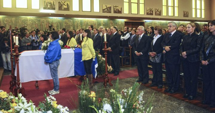 Velorio del Diputado Juan Lobos